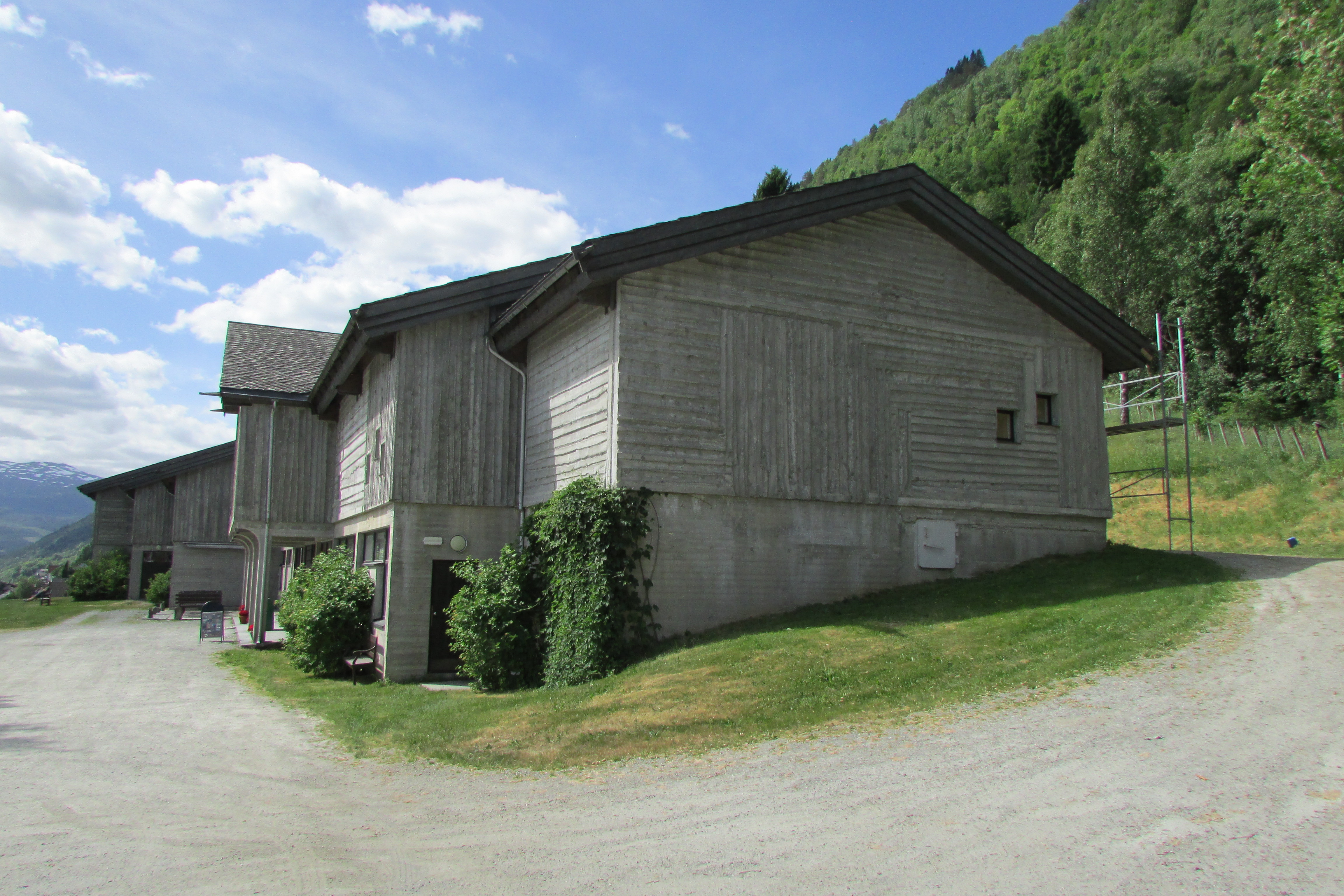 Voss folk museum